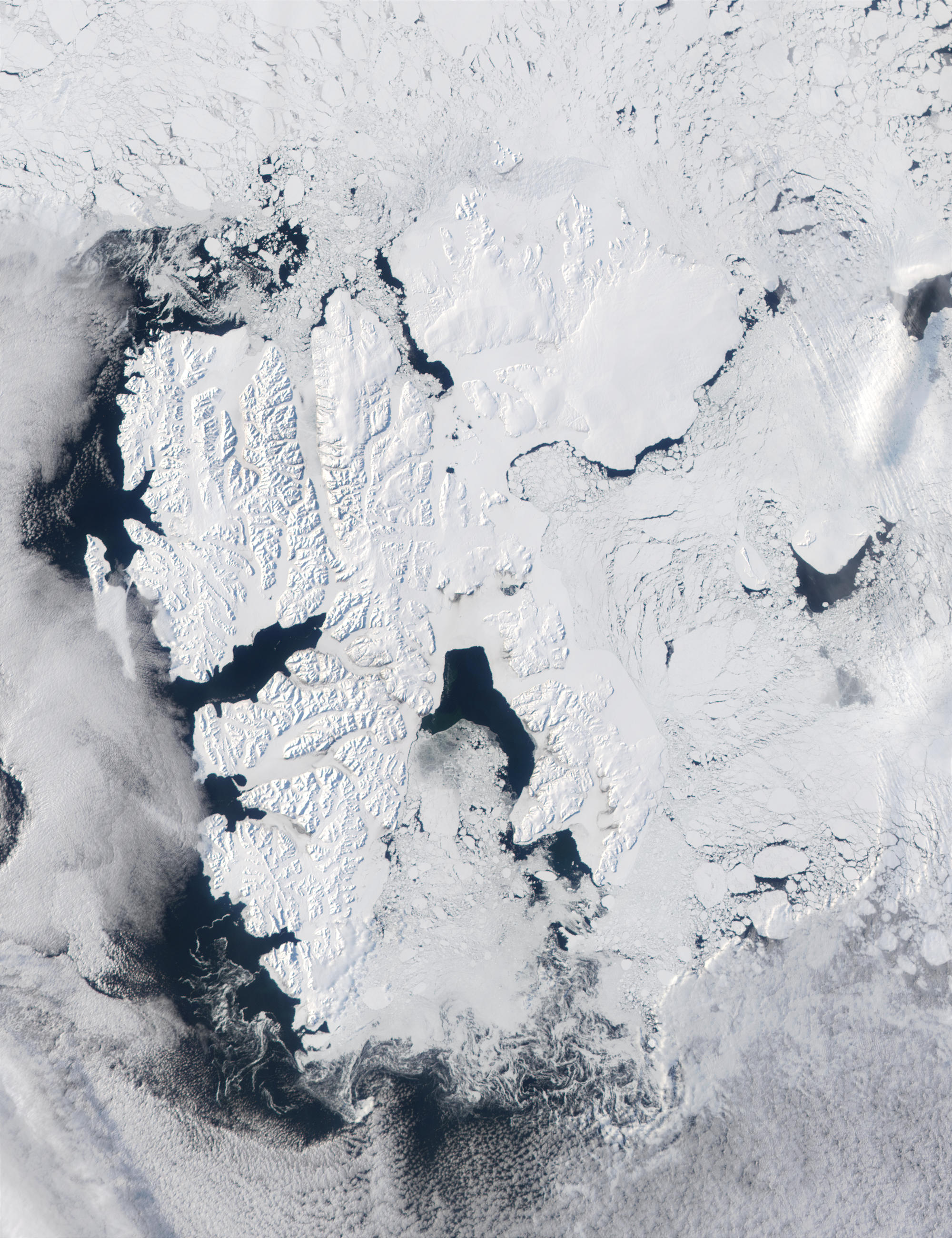 Le Isole Svalbard nel Mar Glaciale Artico